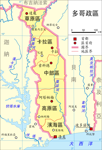 多哥政區。